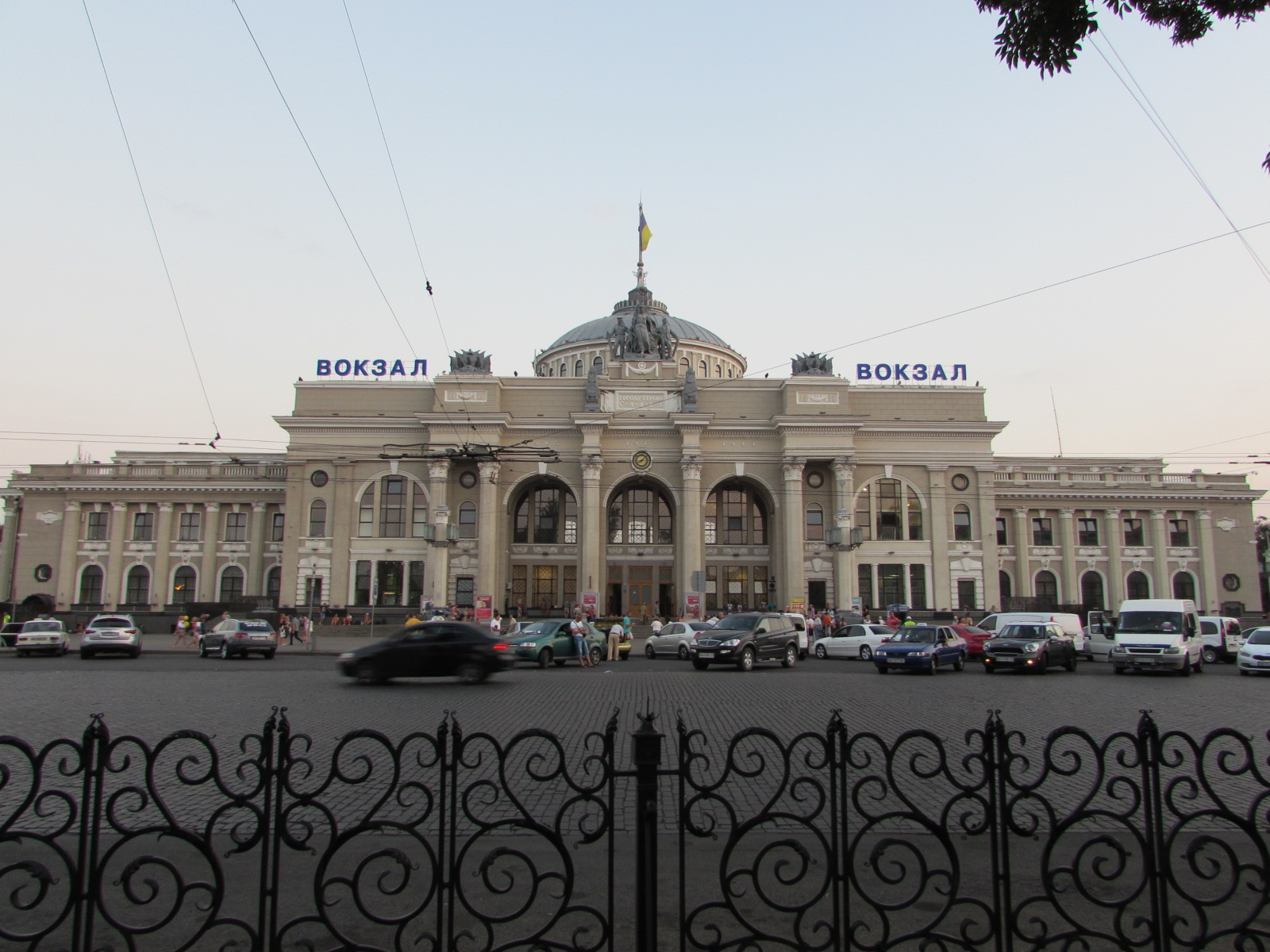 Будівля залізничного вокзалу, Одеса, Привокзальна пл.